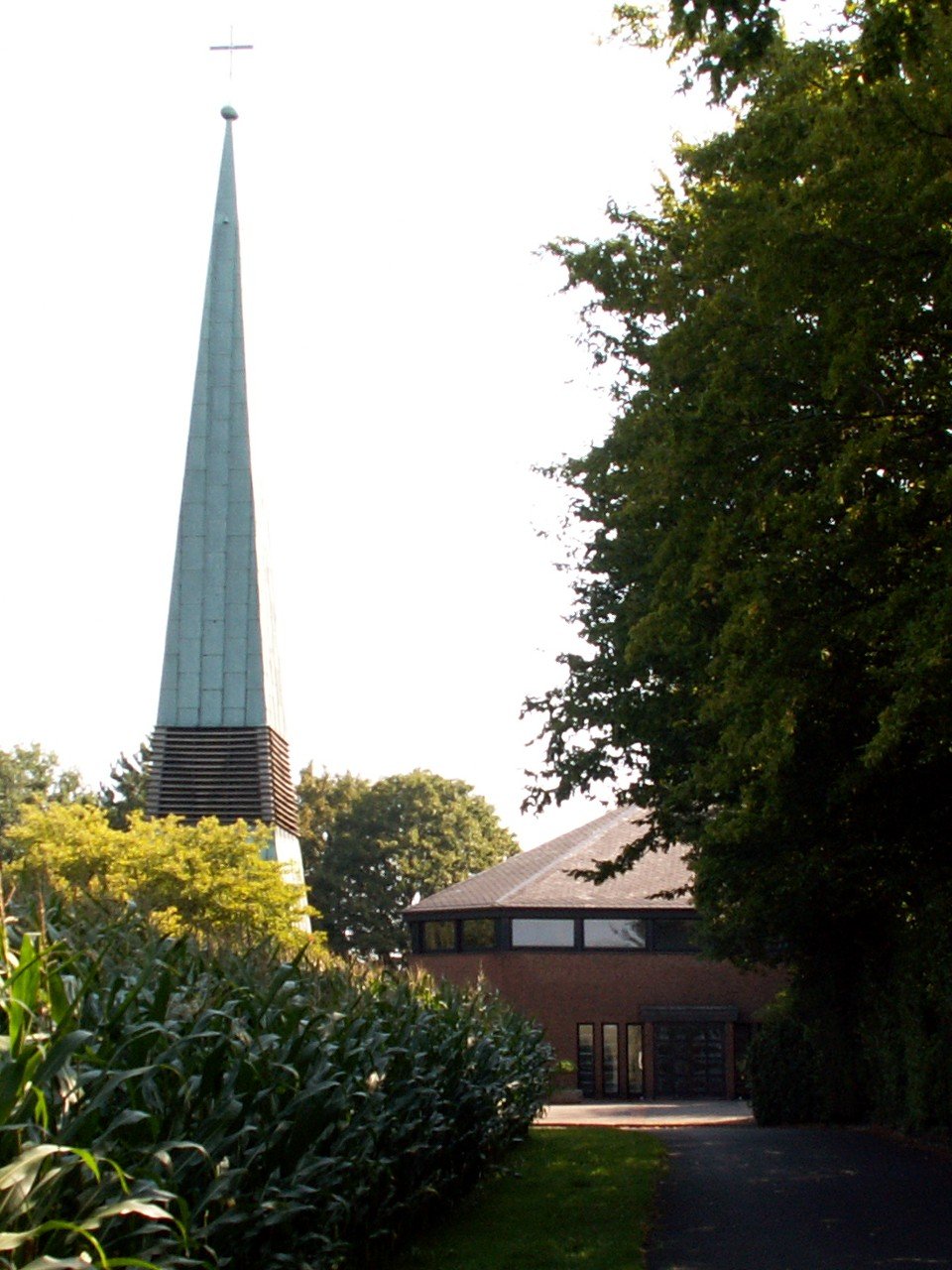 ev. Lukaskirche in Löhne, Stadtteil Gohfeld, Ortschaft Wittel, Ansicht von Westen